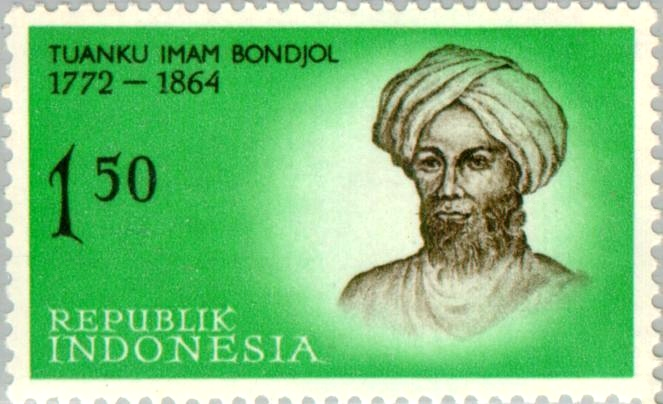 Imam Bonjol